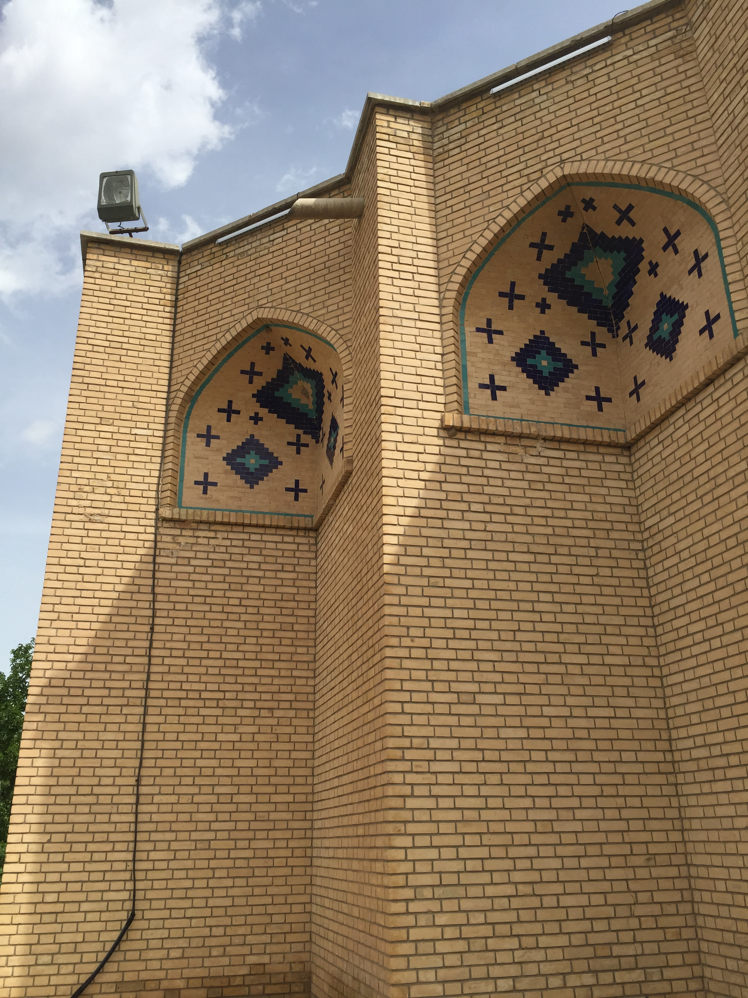 مقبره شیخ ابوالحسن خرقانی